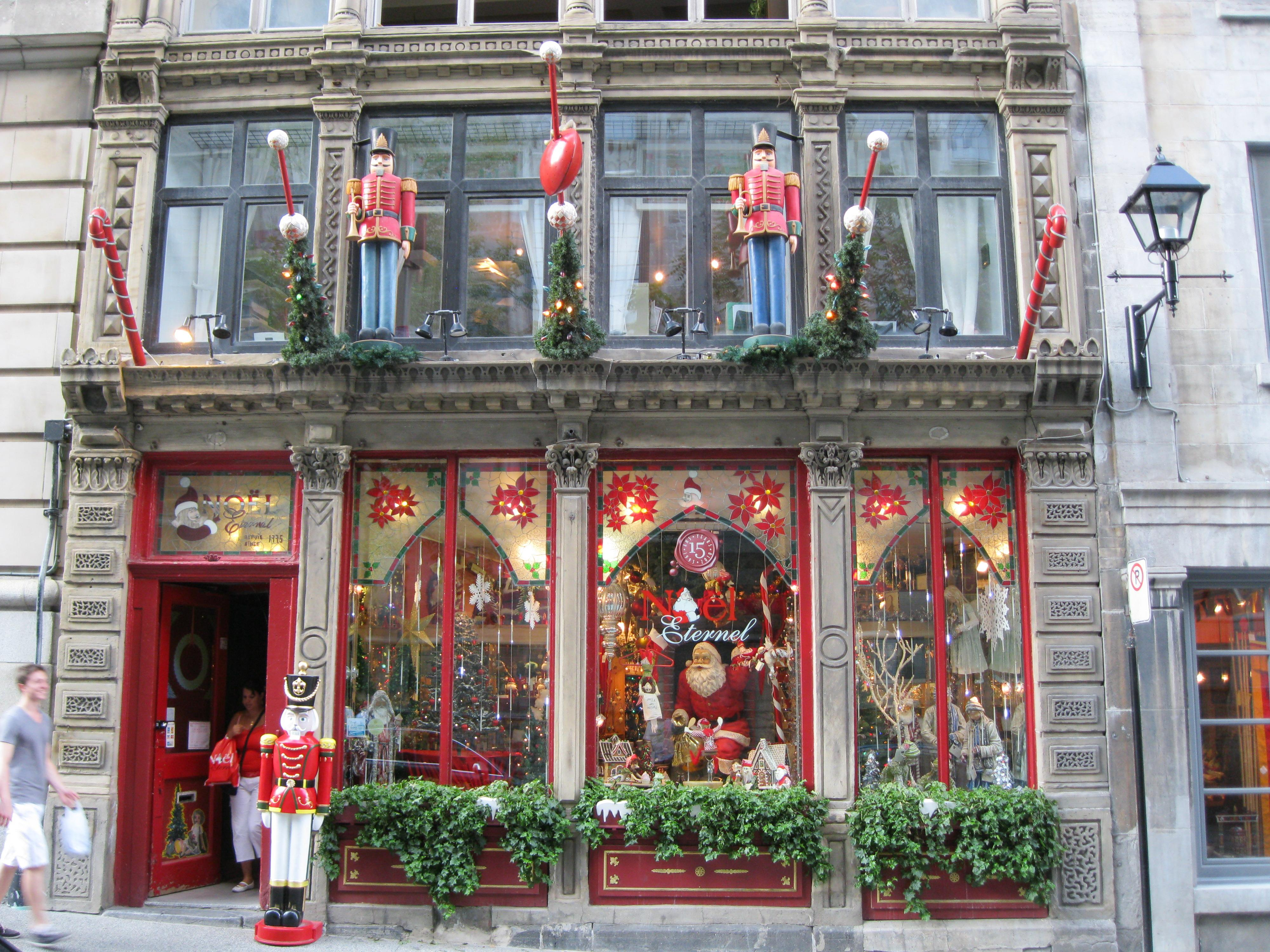 Noël Éternel est une boutique spécialisée dans la vente d'objets relatifs à la fête de Noël. En 2012, elle était située au 461, rue Saint-Sulpice, Montréal. En 2016, elle est au 60, rue Notre-Dame Ouest.